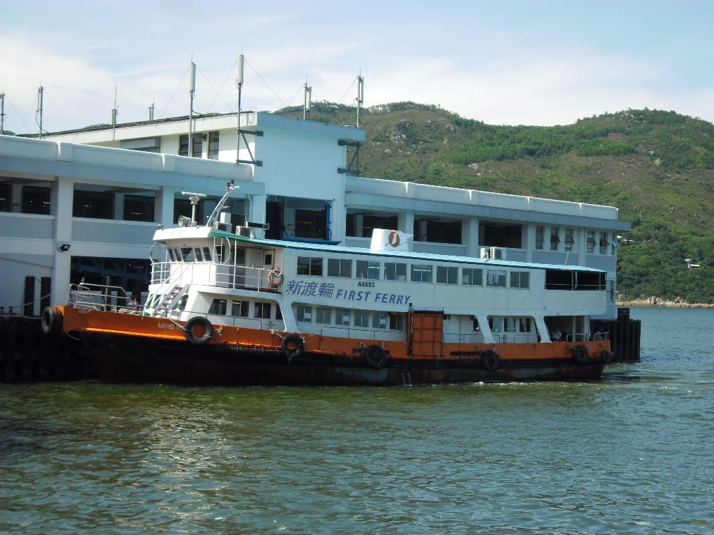 中文（香港）: 新渡輪「名河號」，為橫水渡航線的唯一船隻